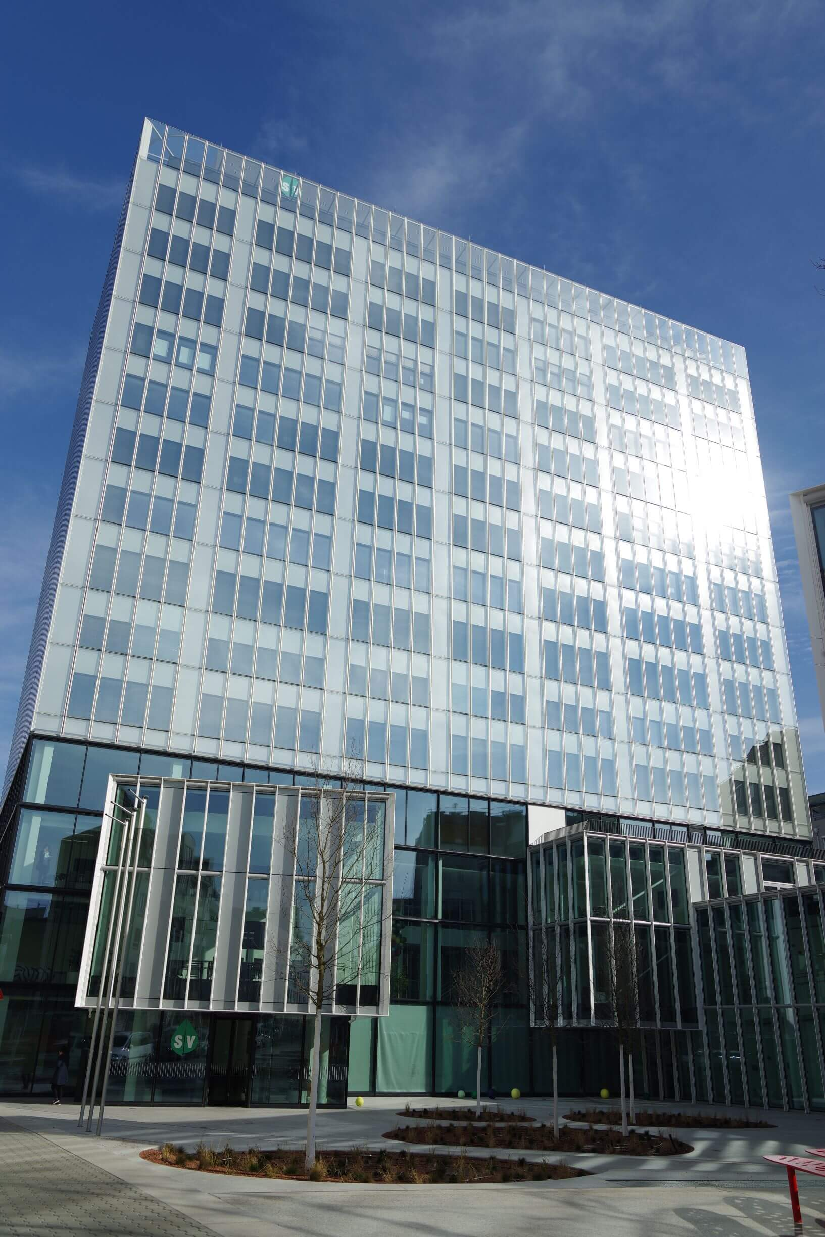 Bürogebäude